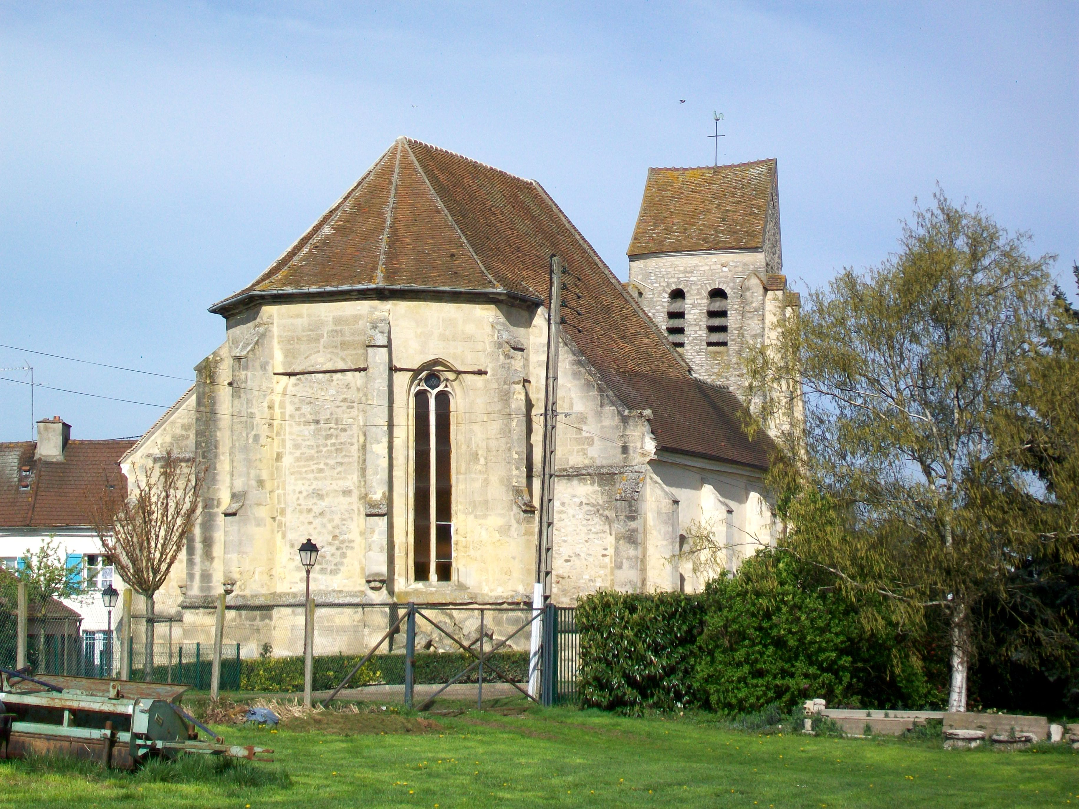 Chœur de l'église Saint-Léger de Jagny-sous-Bois. Il a été ajouté au début du XVIe siècle dans le style de la première Renaissance.